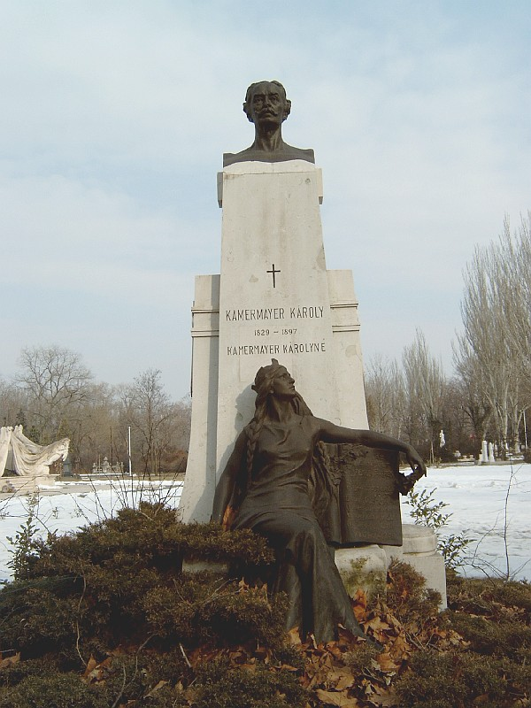 Kamermayer Károly (Pest, 1829. május 14. – Abbazia, 1897. június 5.) Budapest első polgármesterének sírja. Kerepesi temető: 28-díszsor-36 [szobrász: Donáth Gyula].